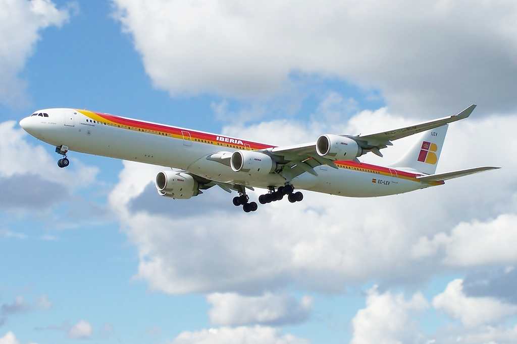 EC-LEV A340-600 Iberia